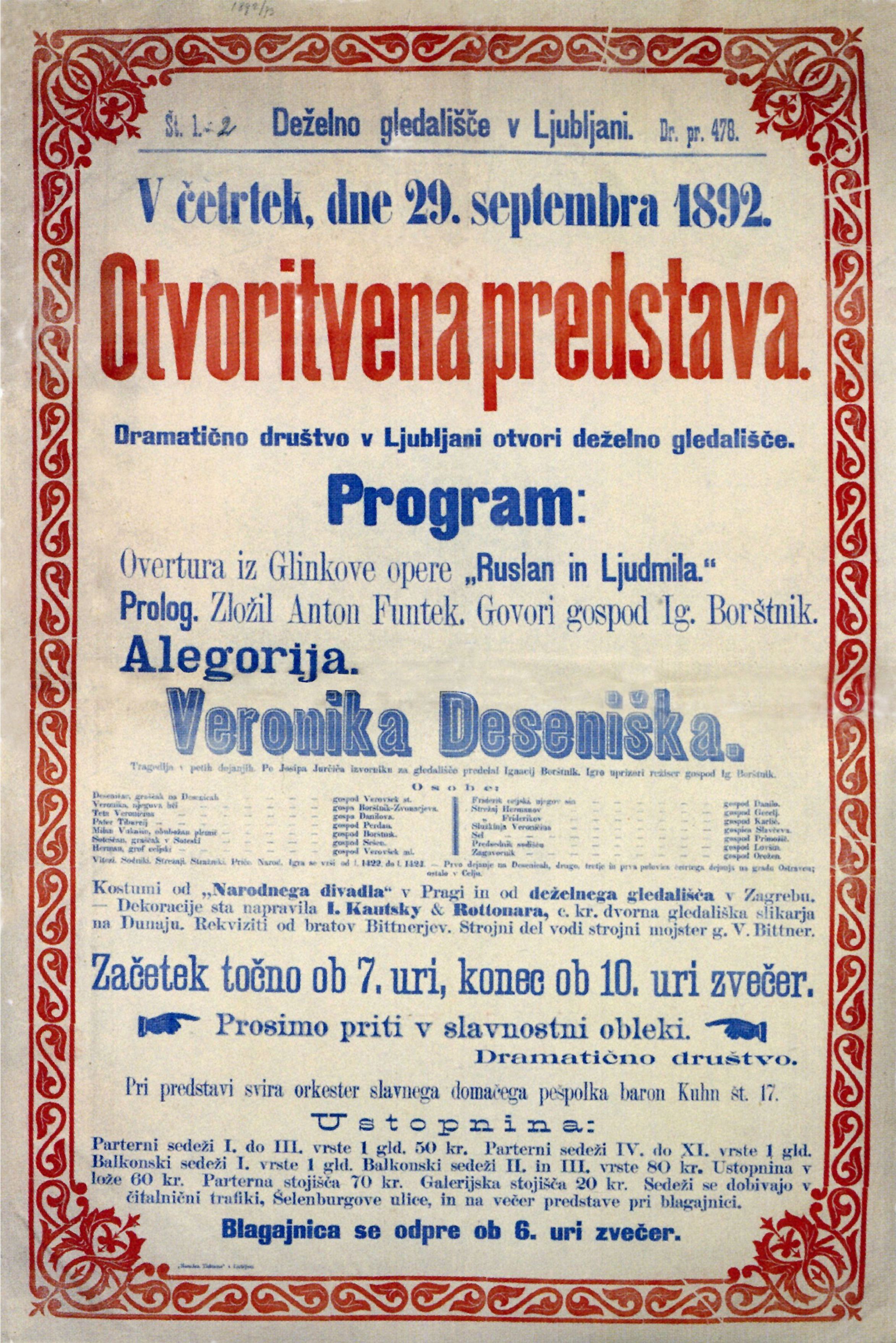 Plakat otvoritvene predstave.